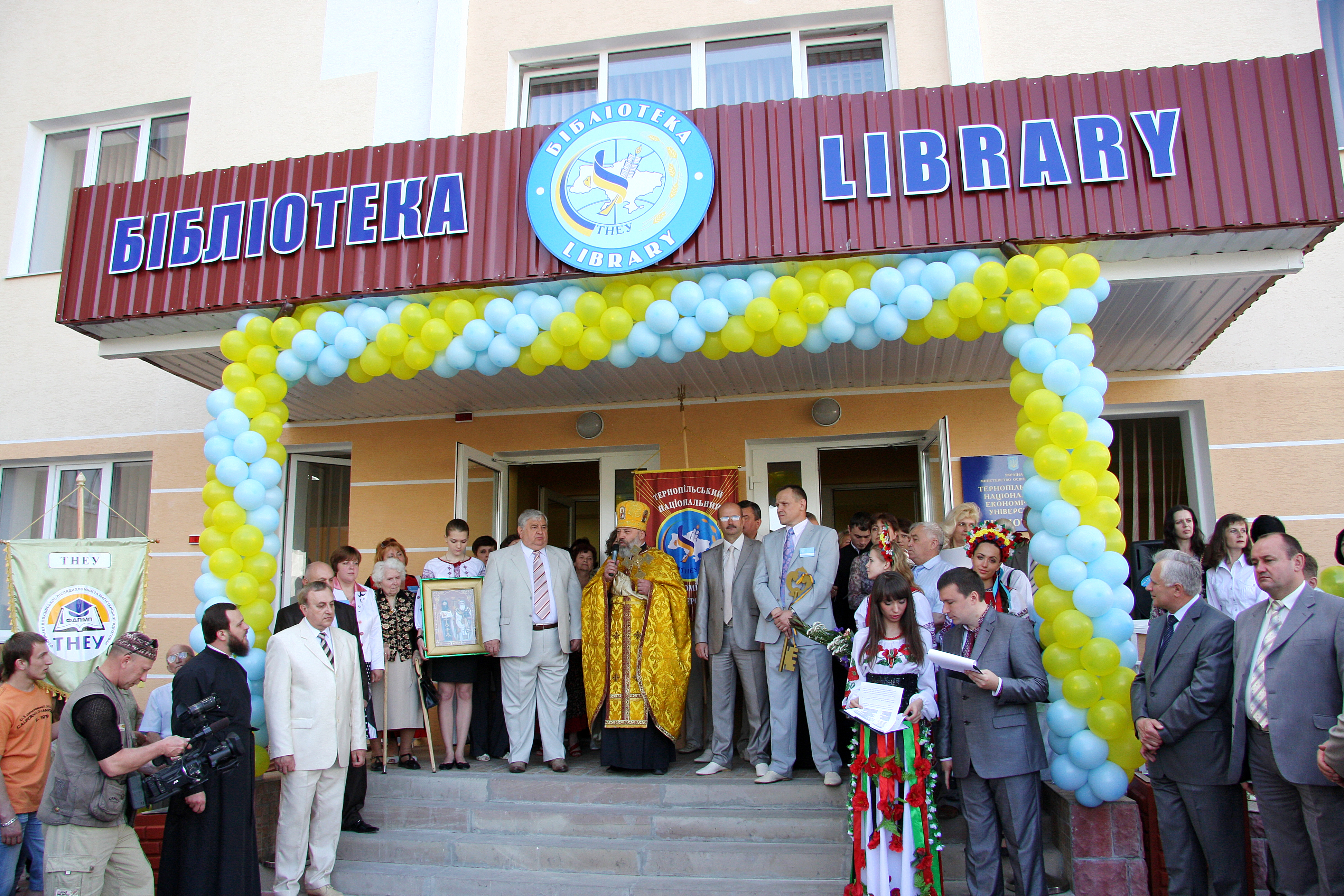 Відкриття нового приміщення бібліотеки ТНЕУ